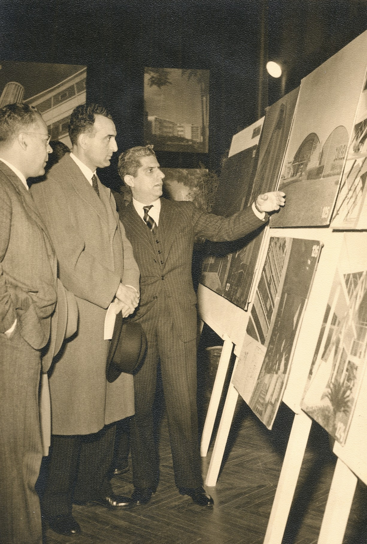 Fotografia do Fundo Correio da Manhã, sob a guarda do Arquivo Nacional.